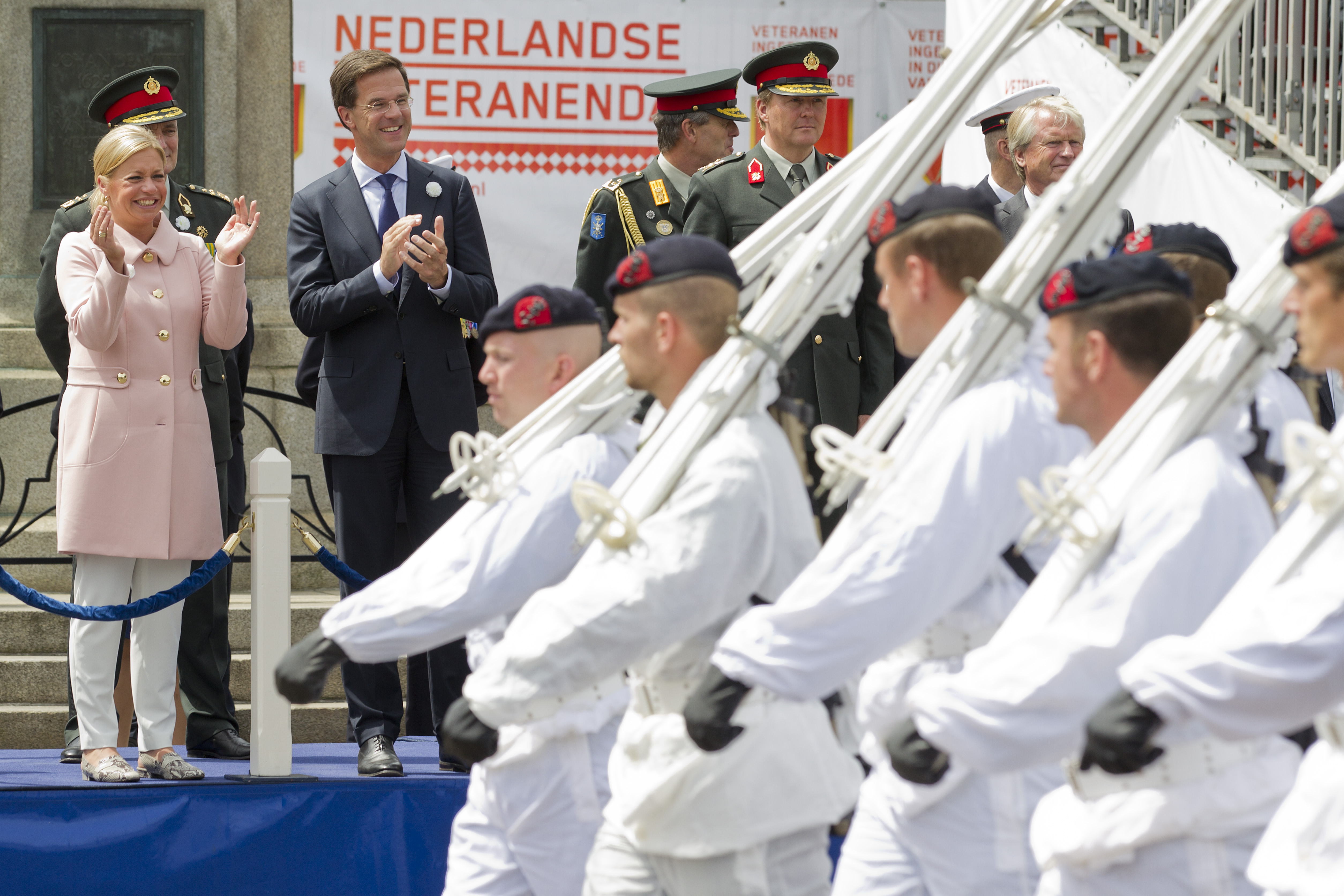 Den Haag, 28 juni 2014 Veteranendag 2014 oa in de Ridderzaal, het defile voor de koning Willem Alexander, minister president Mark Rutte, minister van defemsie Jeanine Hennis Plasschaart en de CDS generaal Tom Middendorp .